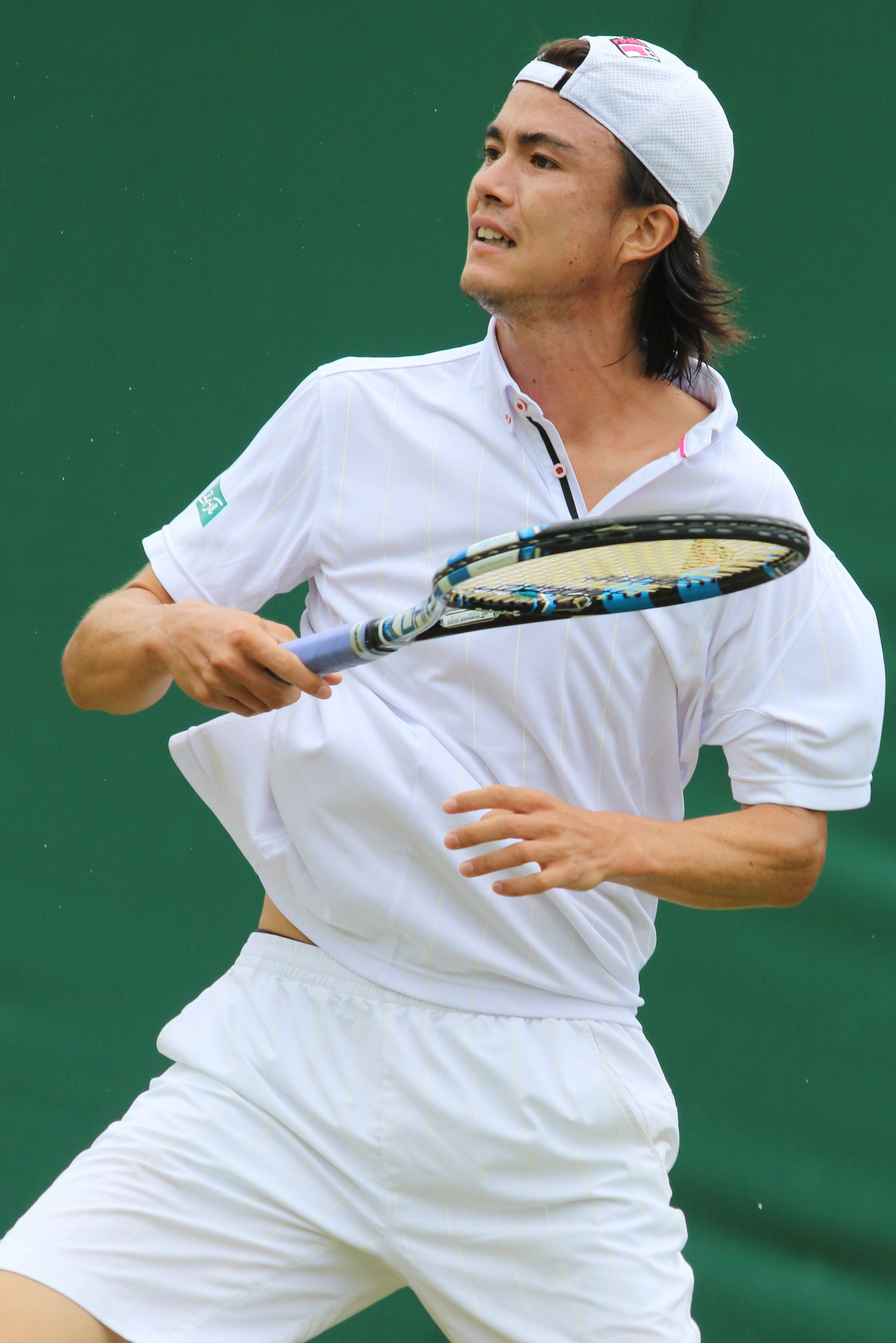 Daniel WM17 (24)